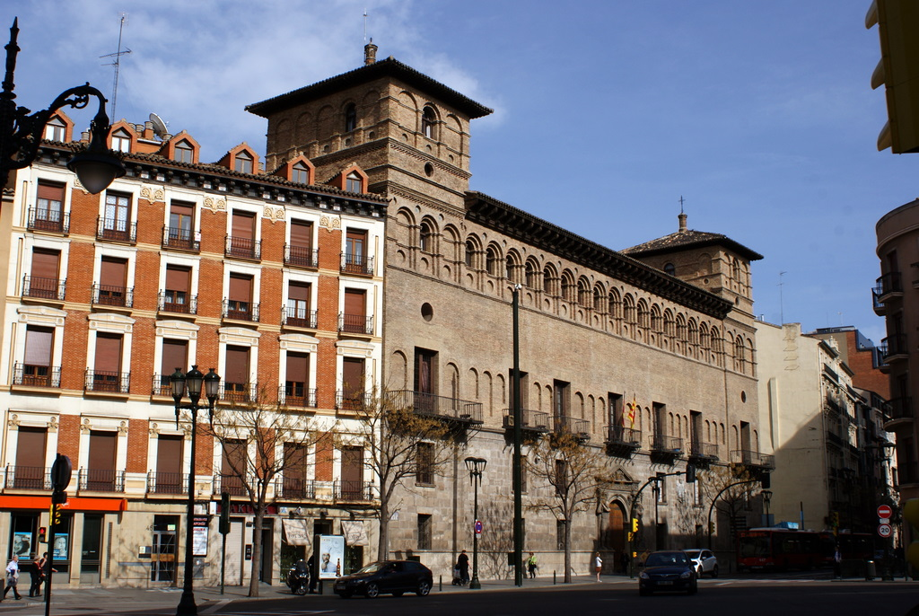 Casa de la Audiencia o Palacio de los Condes de Luna. Se comenzó la construcción en 1551; las piedras del zócalo provienen de la muralla romana. Zaragoza, Aragón